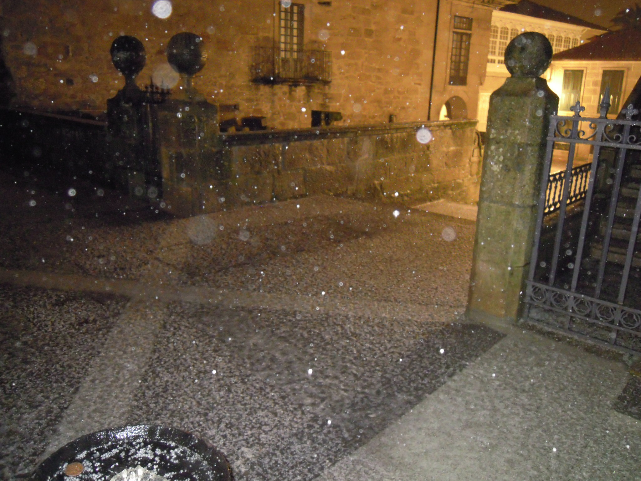 Saraiba xunto ao edificio García Flórez do museo de Pontevedra.